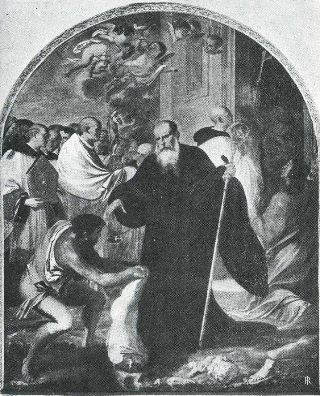 Agostino Scilla, San Benedetto da Norcia, Museo Regionale di Messina.